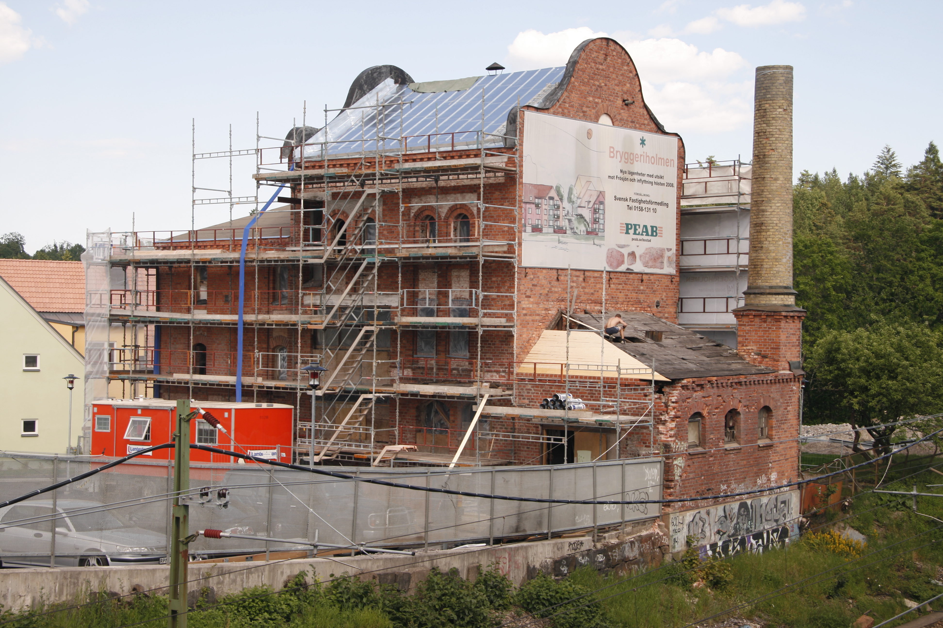 Gnesta bryggeri i samband med fasad och tankrenovering 2009.